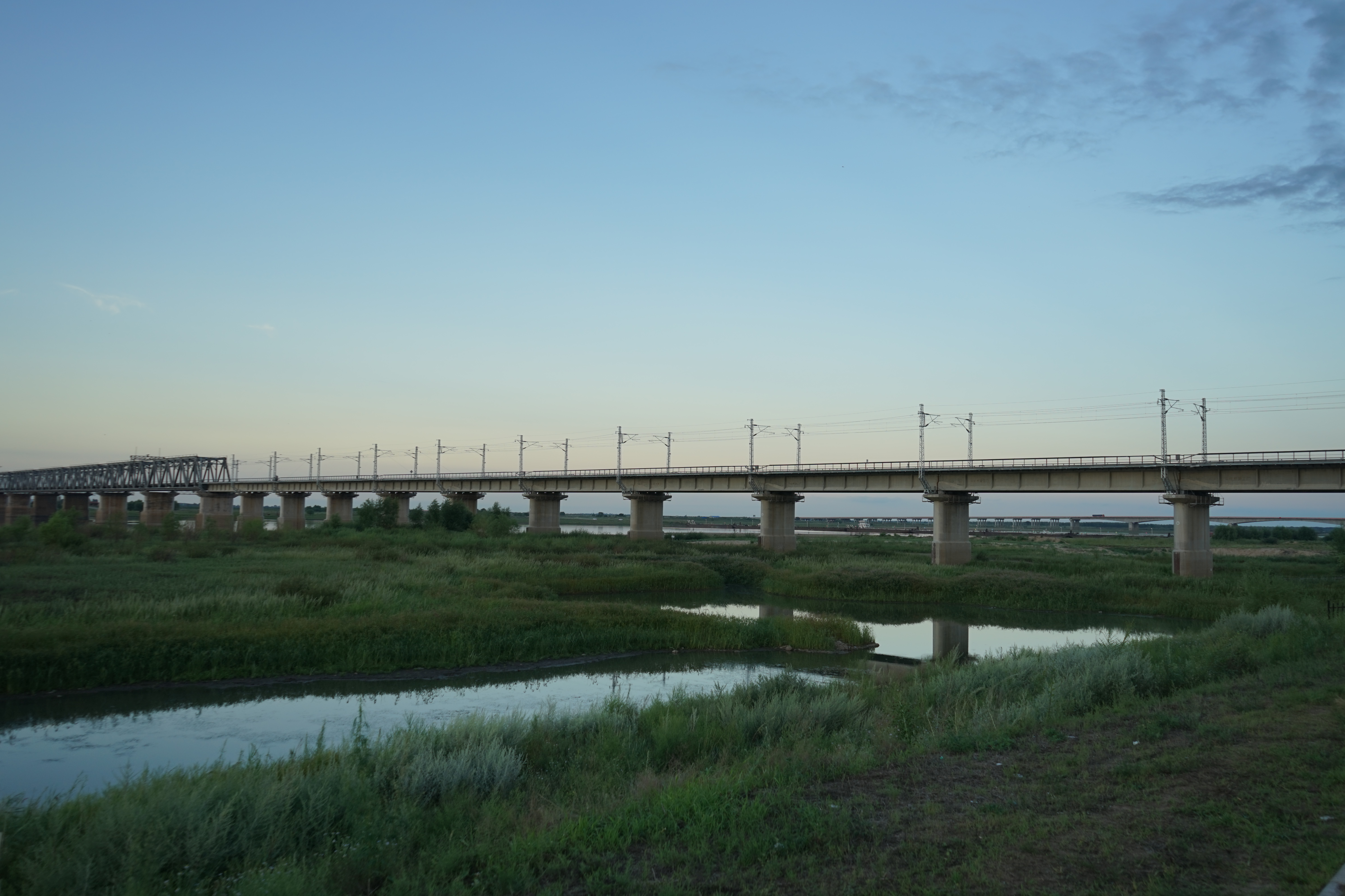 中文（中国大陆）: 嫩江504铁路大桥2017